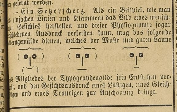 Smiley in einer Zeitung aus 1893 - Kreisblatt für den Kreis Malmedy - Ausgabe 2. September 1893. Text: Ein Setzerscherz: Als ein Beispiel, wie man aus einfachen Linien und Klammern das Bild eines menschlichen Gesichtes herstellen und dieser Physiognomie sogar verschiedenen Ausdruck verleihen kann, mag das folgende Letterngemälde dienen, welches der Muße und guten Laune des Mitgliedes der Typographiegilde sein Entstehen verdankt, und den Gesichtsausdruck eines Lustigen, eines Gleichgültigen und eines Traurigen zur Anschauung bringt.